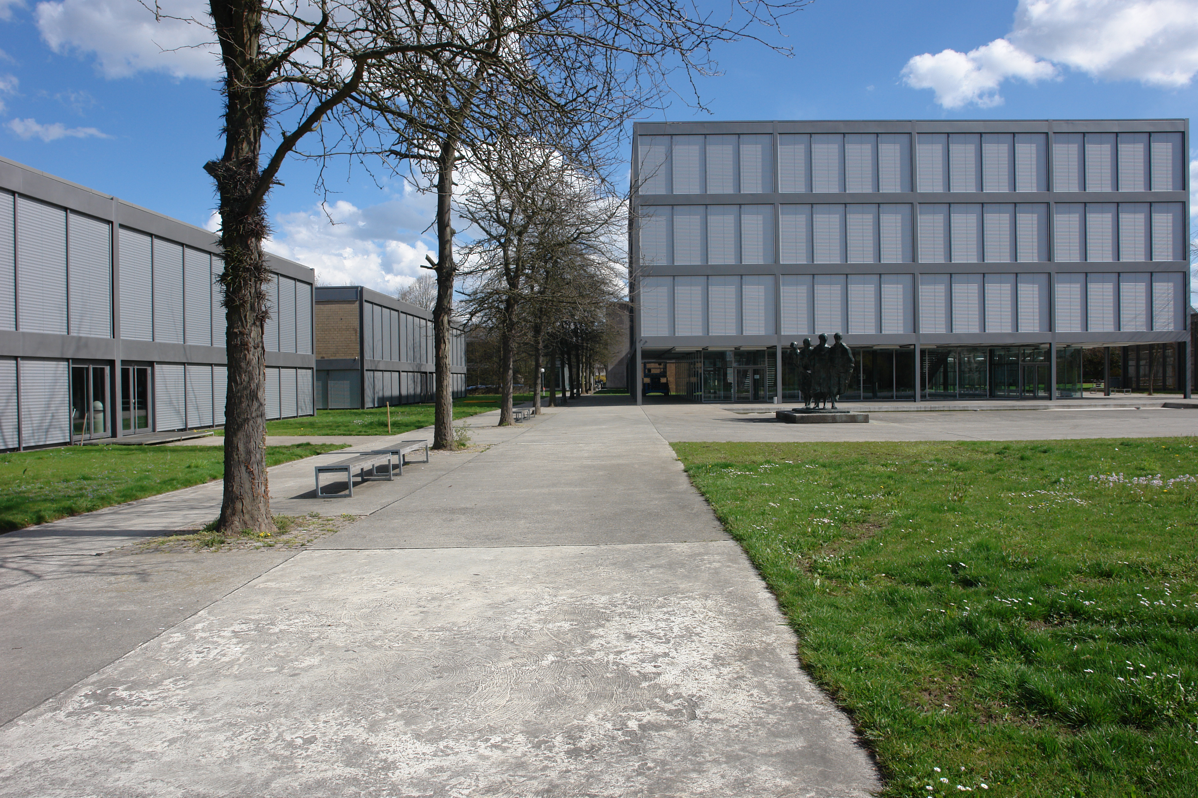 Kantonsschule Baden Turnhalle Wettbewerb 1961, Ausführung 1962-64 Architekt:Fritz Haller